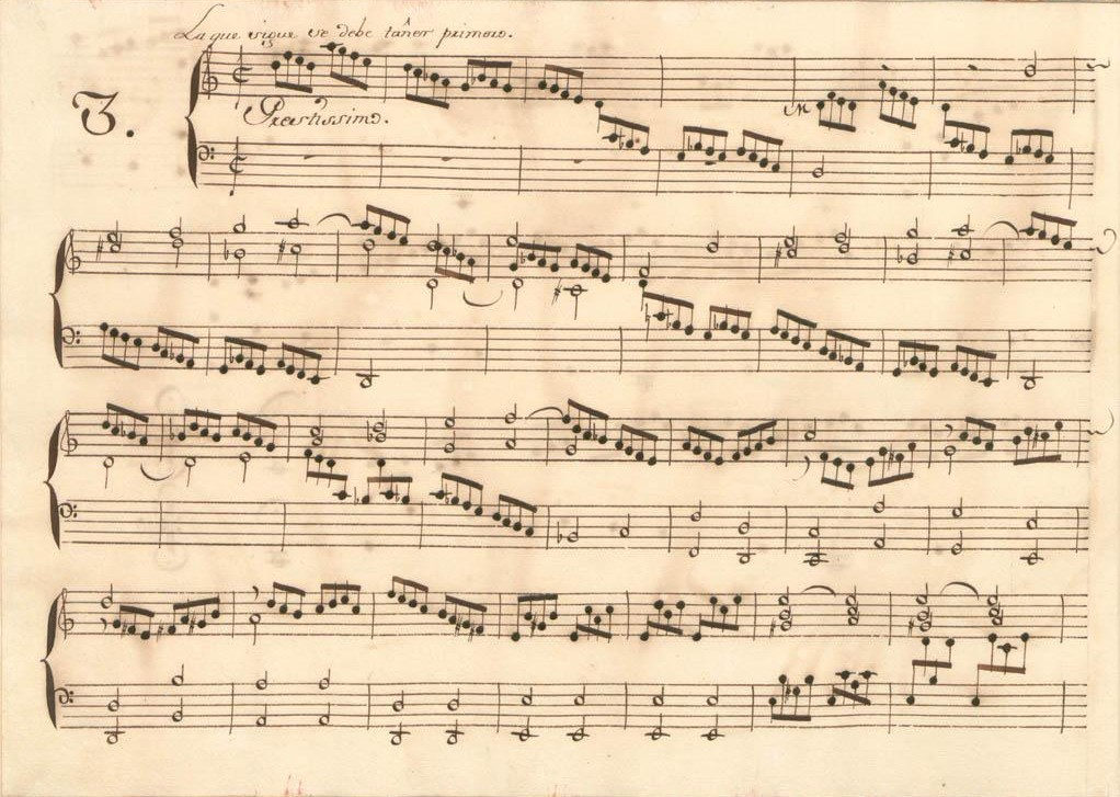 La sonate K. 517, telle qu'elle se présente dans le manuscrit de Parme, volume XV no. 3. L'annotation du copiste : « La sonate qui suit doit être jouée en premier », c'est-à-dire avant la K. 416.